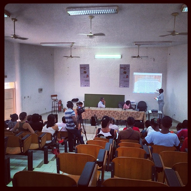 Sala cheia de pessoas empreendedoras "adormecidas" no ciclo de eventos "Small Talk" sobre empreendedorismo em São Tomé e Príncipe hoje com a presença de palestrantes Claudio Corallo e Hilaria Teixeira. Instituto Superior Politécnico (ISP), São Tomé e Príncipe